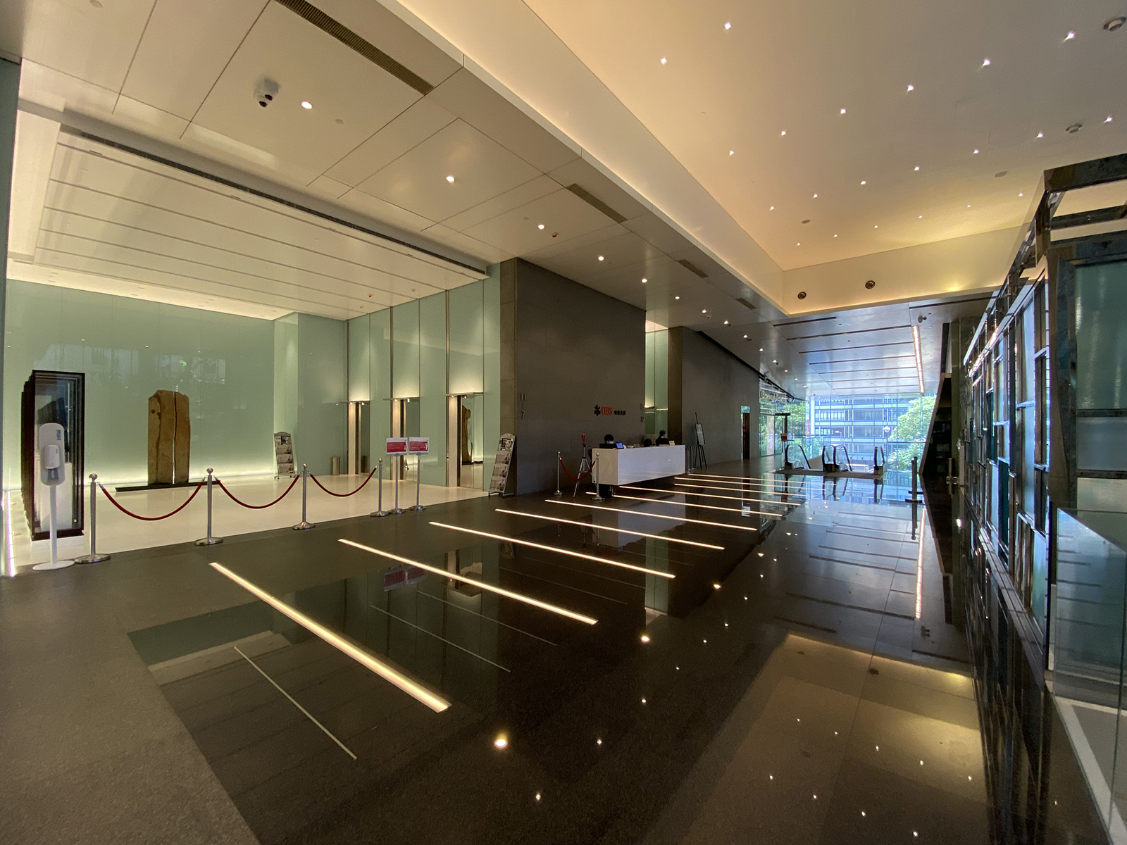 One Peking Lobby